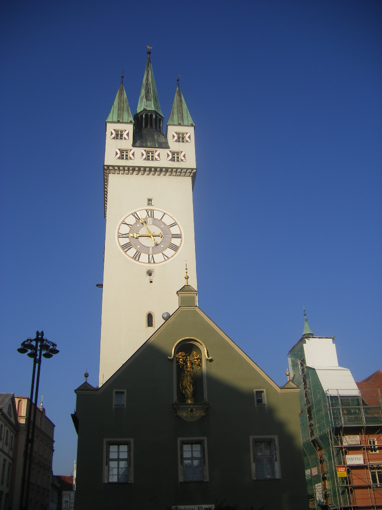 Straubing, gotischer Stadtturm